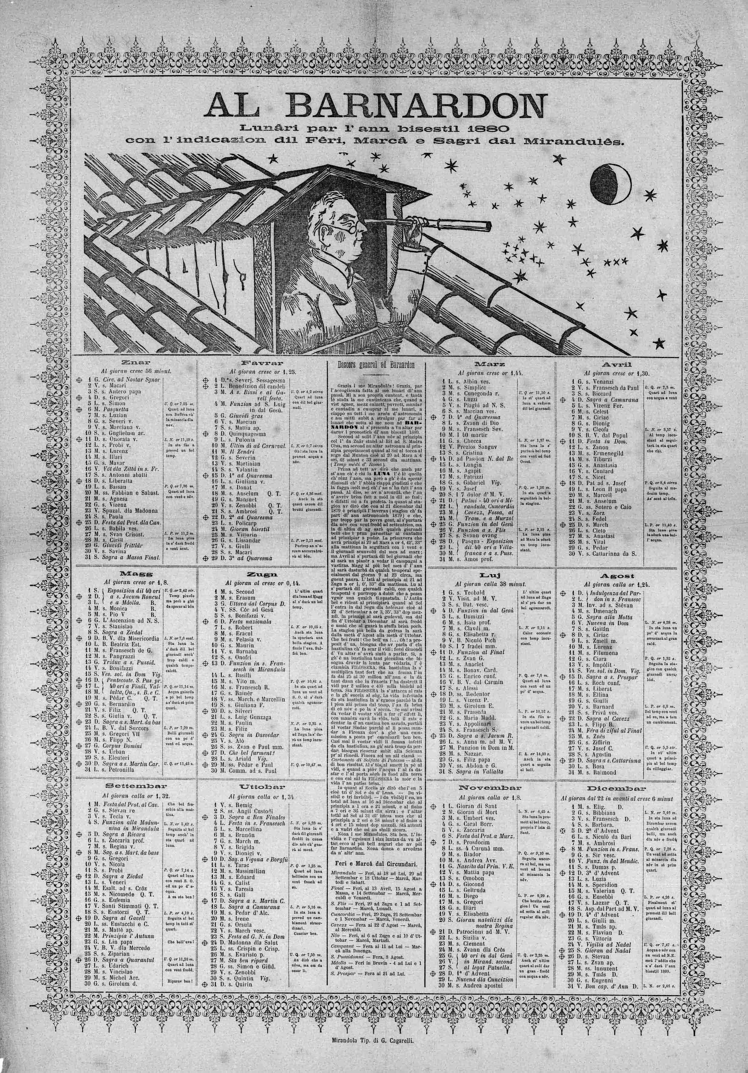 Emiliàn e rumagnòl: Al Barnardon, Lunâri par l'ann biestil 1880 con l'indicazion dil Fêri, Marcâ e Sagri dal Mirandulês